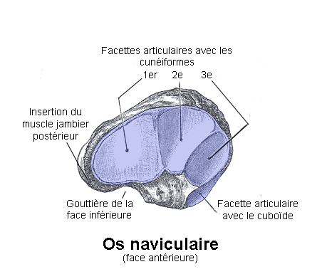 Os naviculaire. Face antérieure. Anatomie humaine